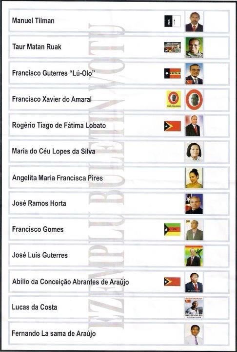 Wahlzettelmuster fürdie Präsidentenwahlen 2012 in Osttimor